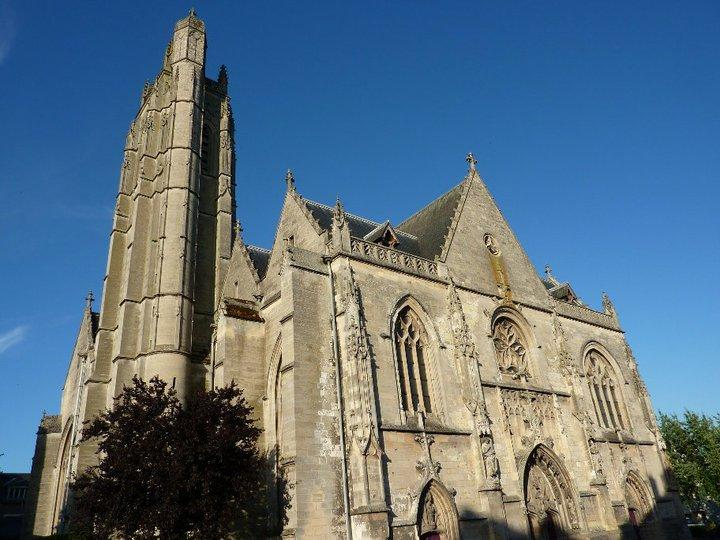 Église de Péronne (Somme, France)